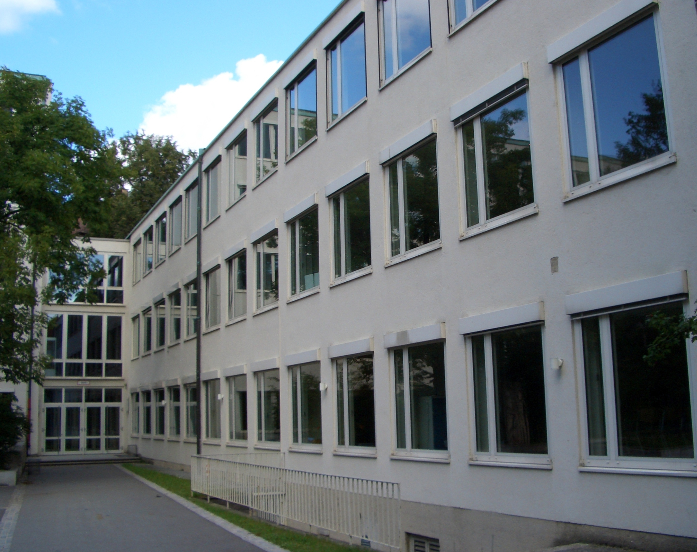 Luitpold-Gymnasium Muenchen, Osteingang